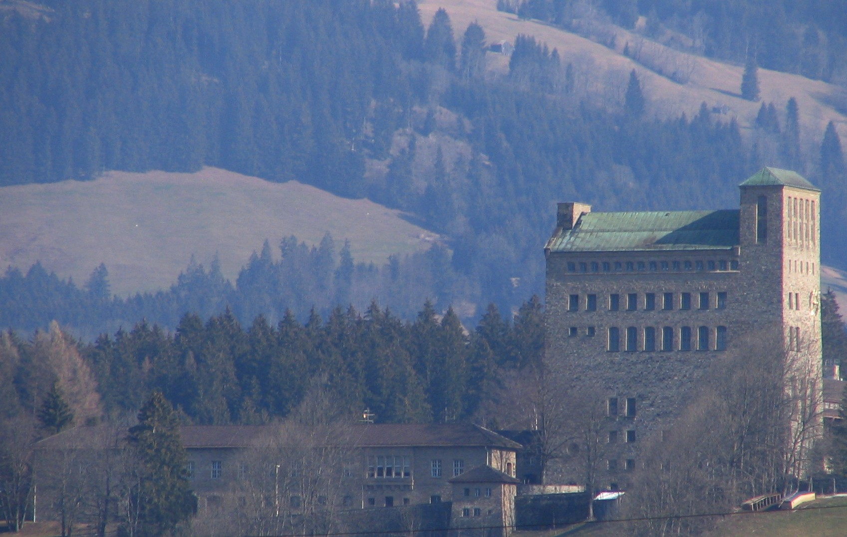 "Die Burg" in Sonthofen Germany